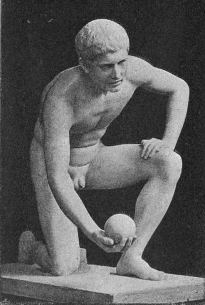 Der Kugelspieler